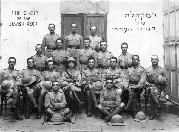 מקהלת הגדוד העברי